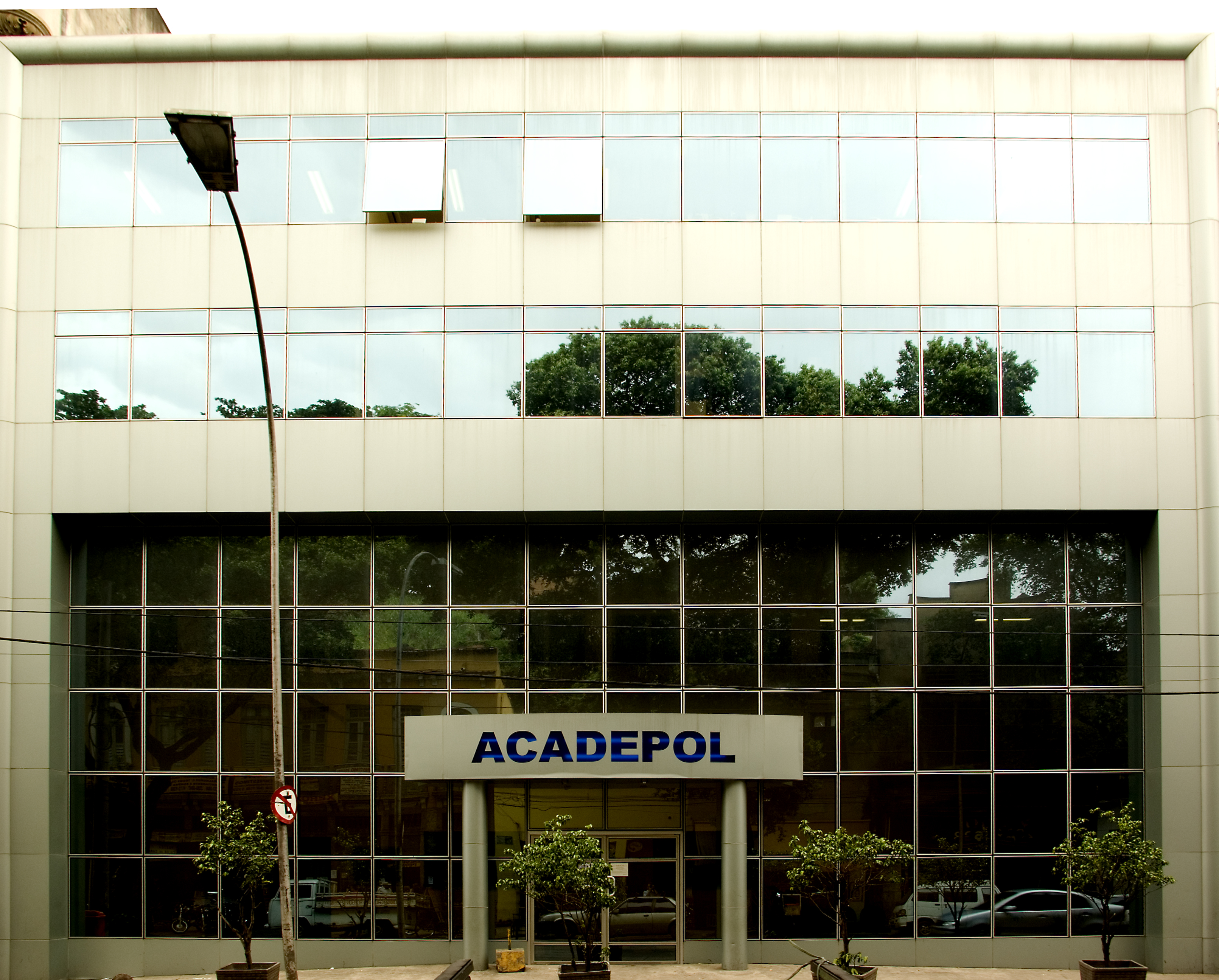 Rio de Janeiro State Police Academy